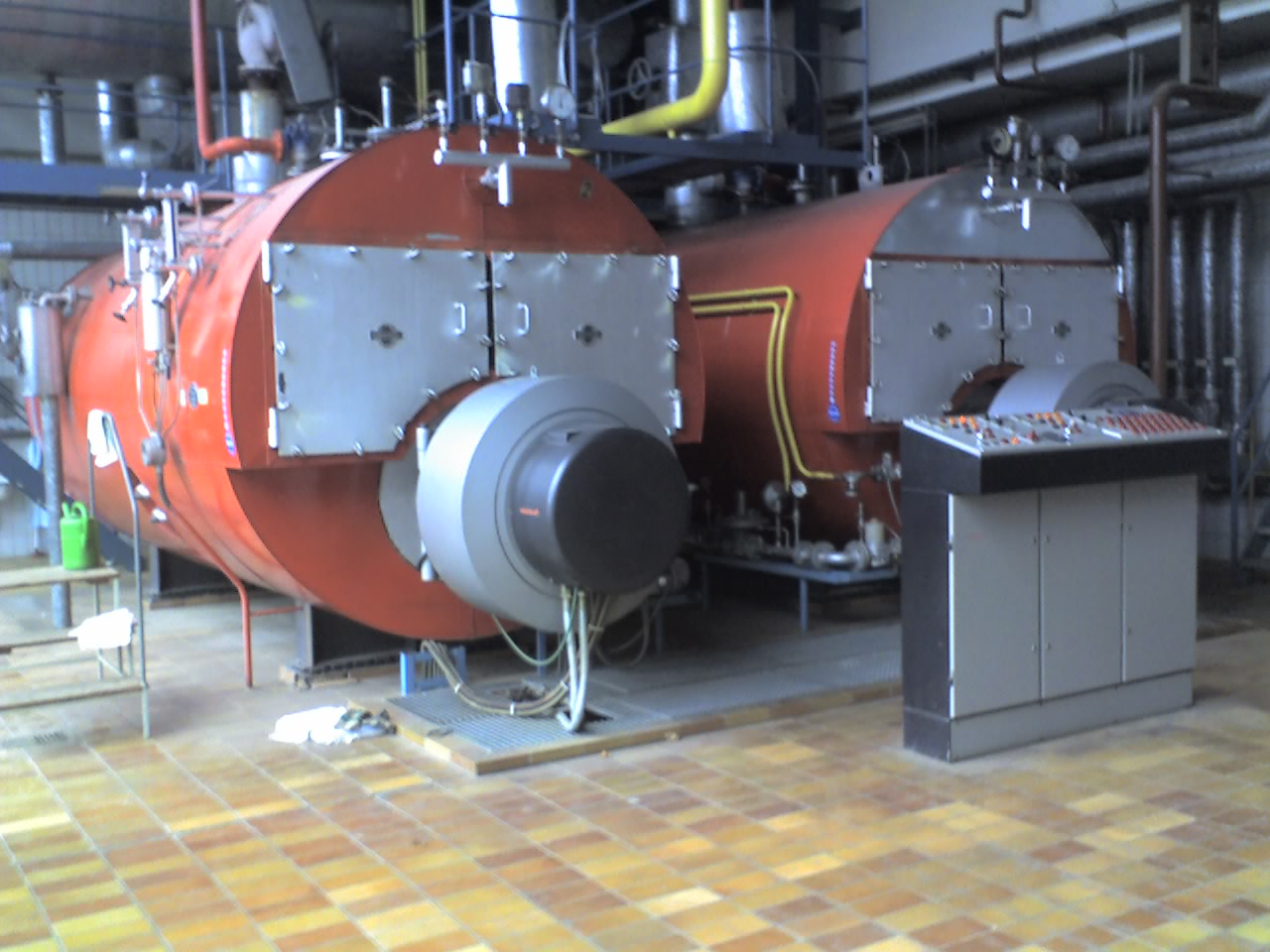 Flammrohrrauchrohrkessel der Staatsbad GmbH Bad Steben